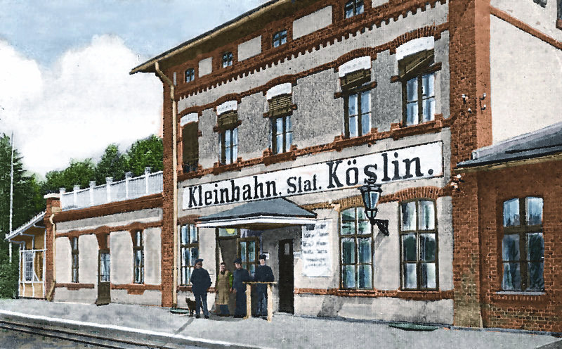 Kolorowanie zdjęcia jest późniejsze